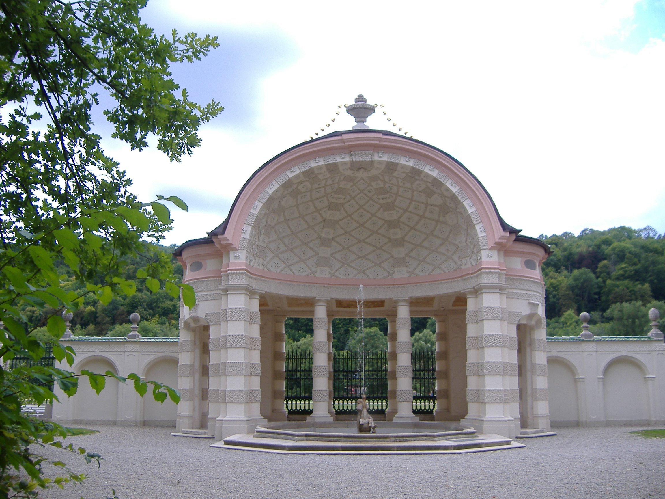 Gartenpavillion im Hofgarten Eichstätt